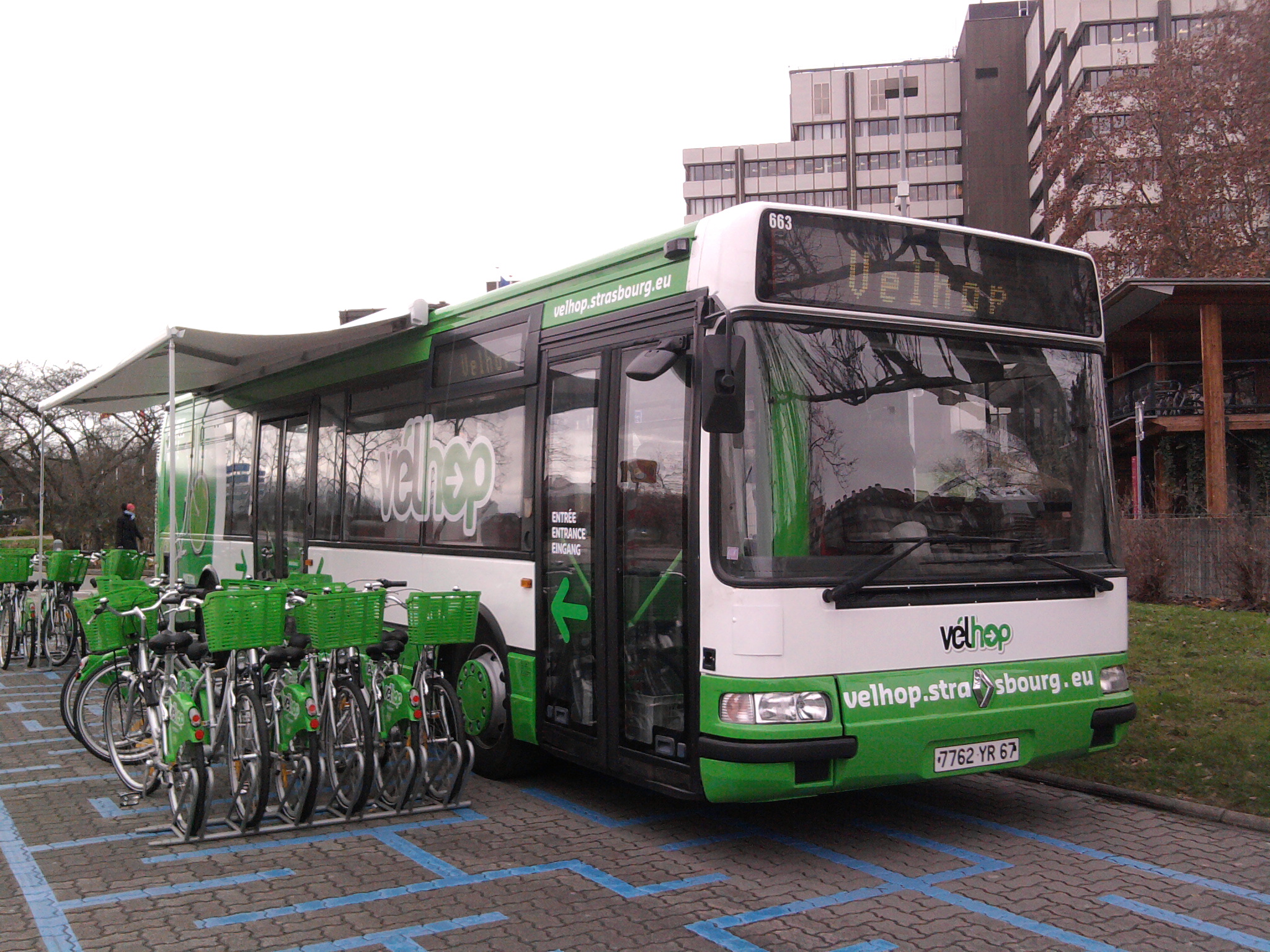 Un bus Velhop (Renault Agora S) à Etoile Bourse, Strasbourg